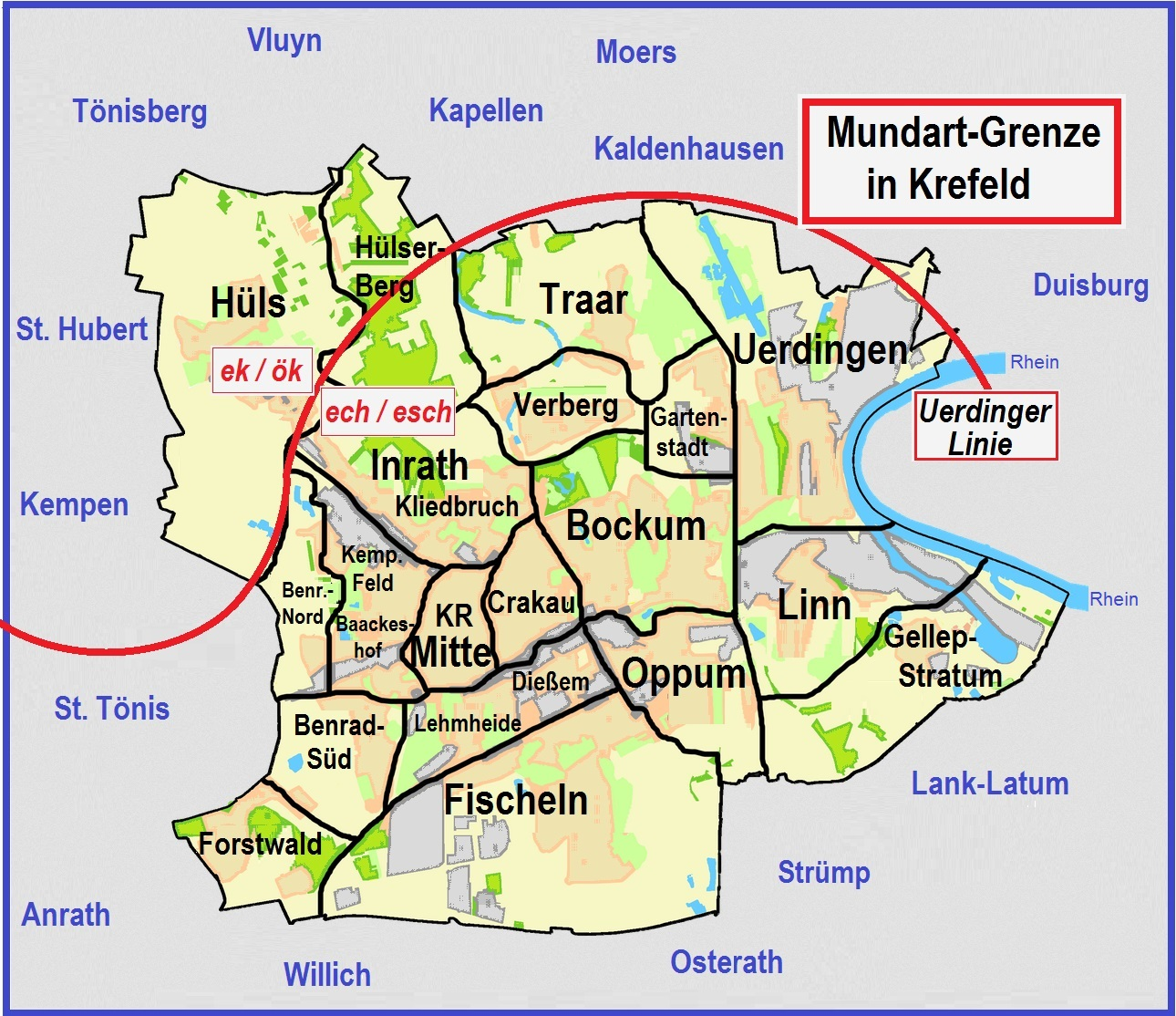 Uerdinger Linie als Mundartgrenze im Stadtgebiet Krefeld ("ich" = ek/ök nördlich der Linie, ech/esch südlich der Linie)